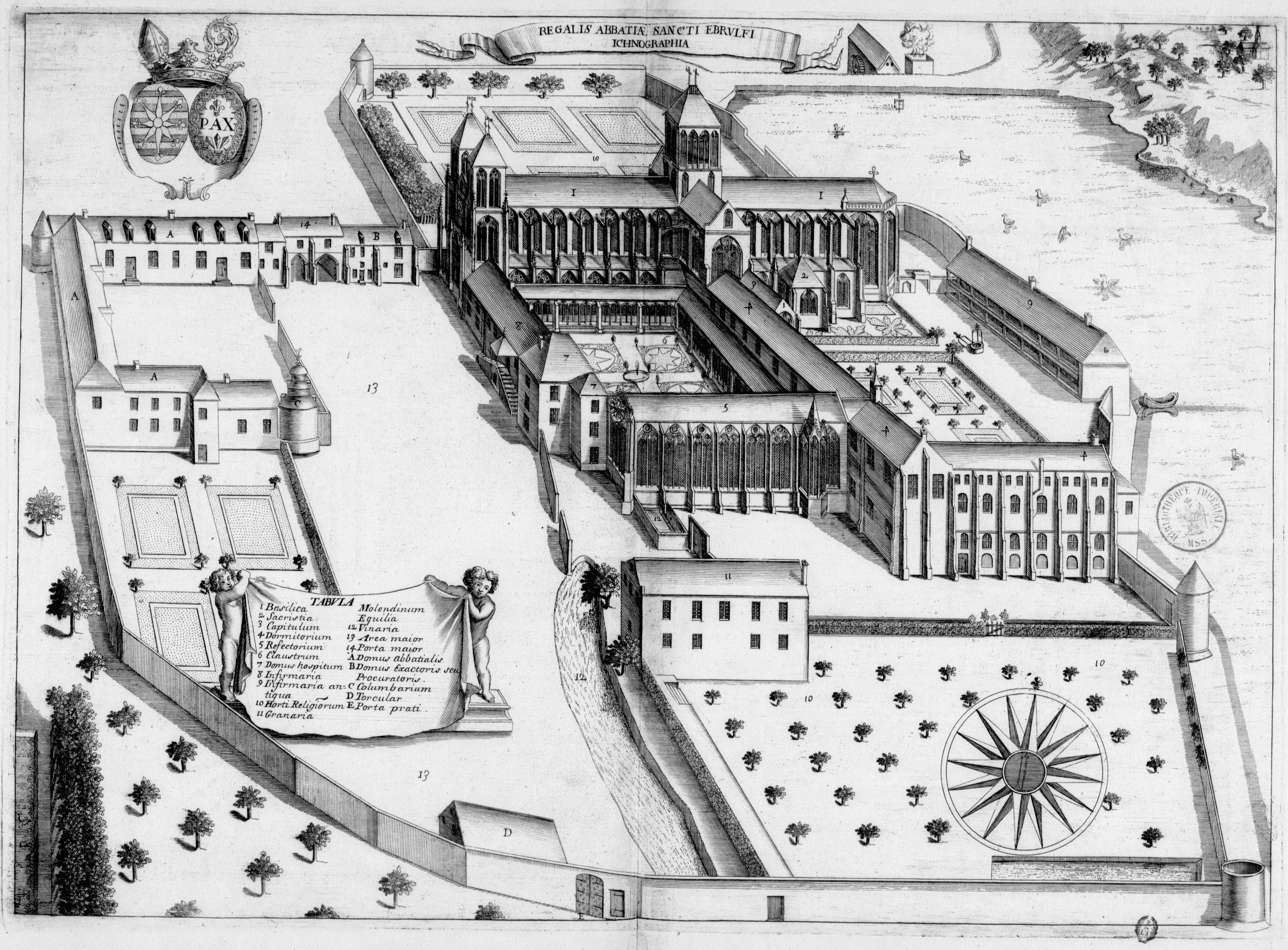 Planche gravée du 17ème siècle représentant l'abbaye de Saint-Évroult, dans le livre Monasticon Gallicanum.